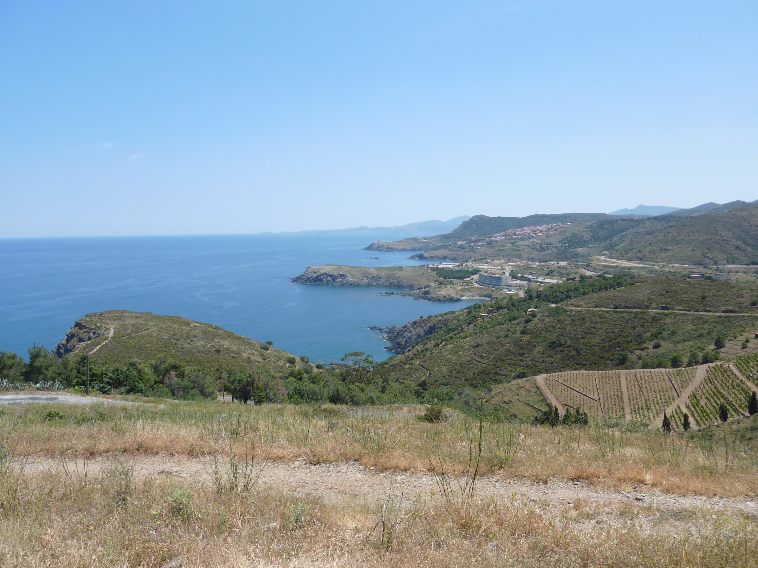 Paysage de la côte méditerranéenne entre Banyuls et Cerbère